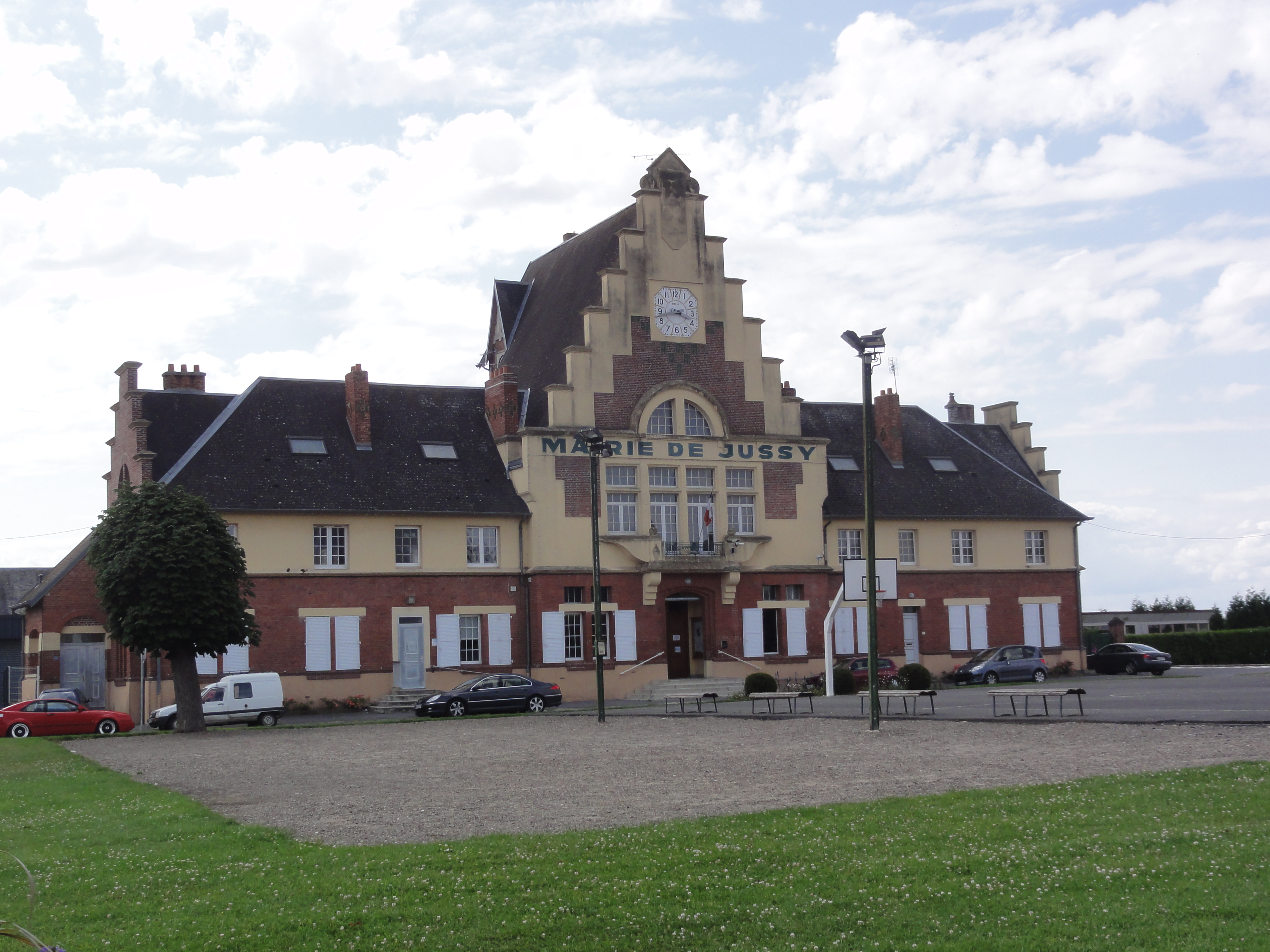 Jussy (Aisne) mairie